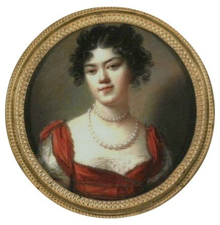 Графиня Софья Ивановна Соллогуб (1792—1854)